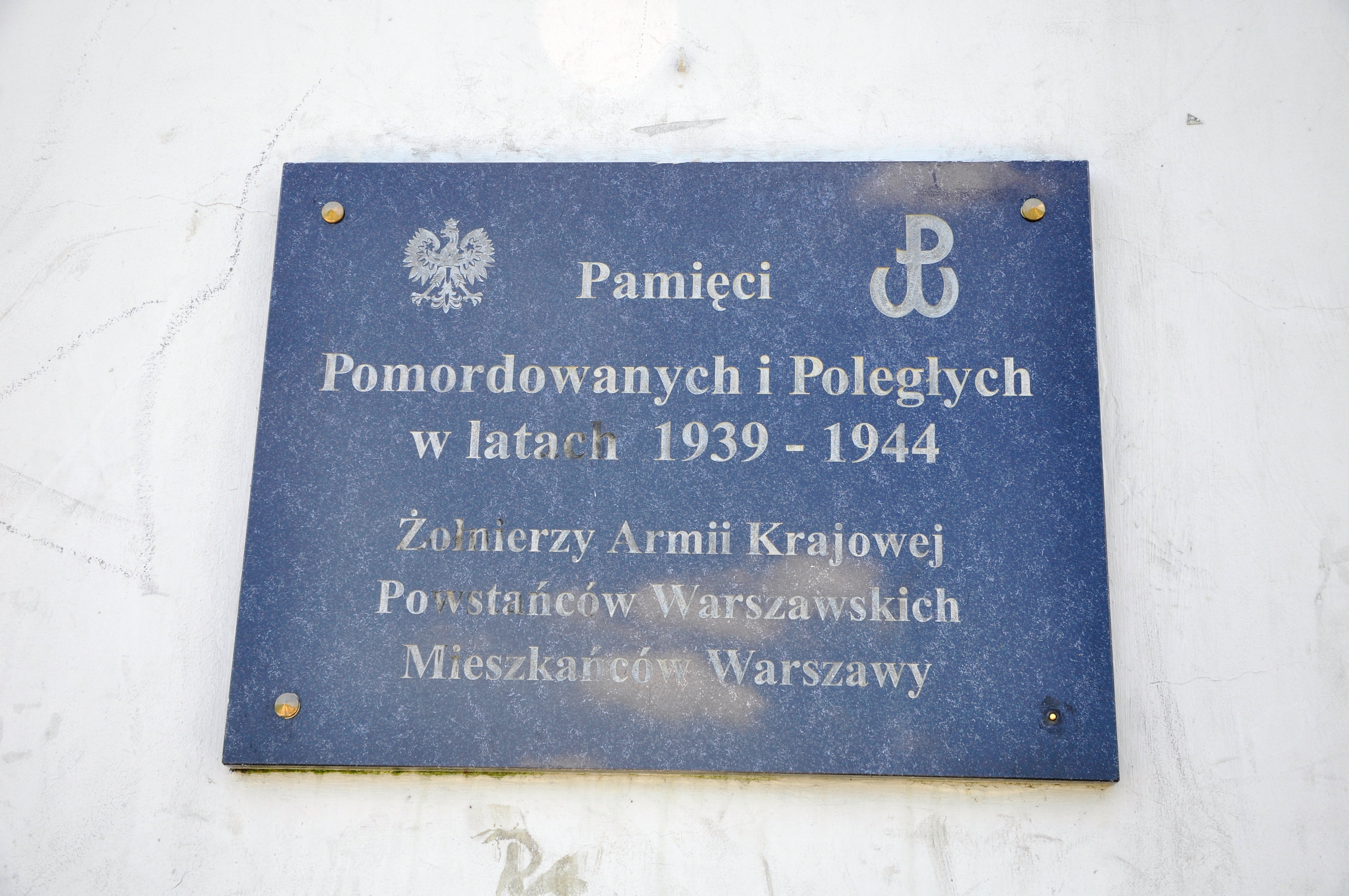 Gedenkplatte Denkmal Kopiec Warschau Mokotow